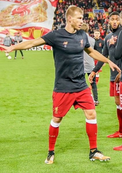 Mohamed Salah, Ragnar Klavan